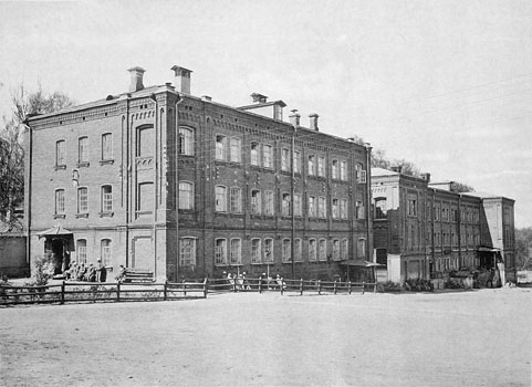 126. Сокольническое ОтдЪленiе Работнаго Дома и Дома Трудолюбiя. Прiютъ для хрониковъ, больница, хлЪбопекарня и богадЪльня.